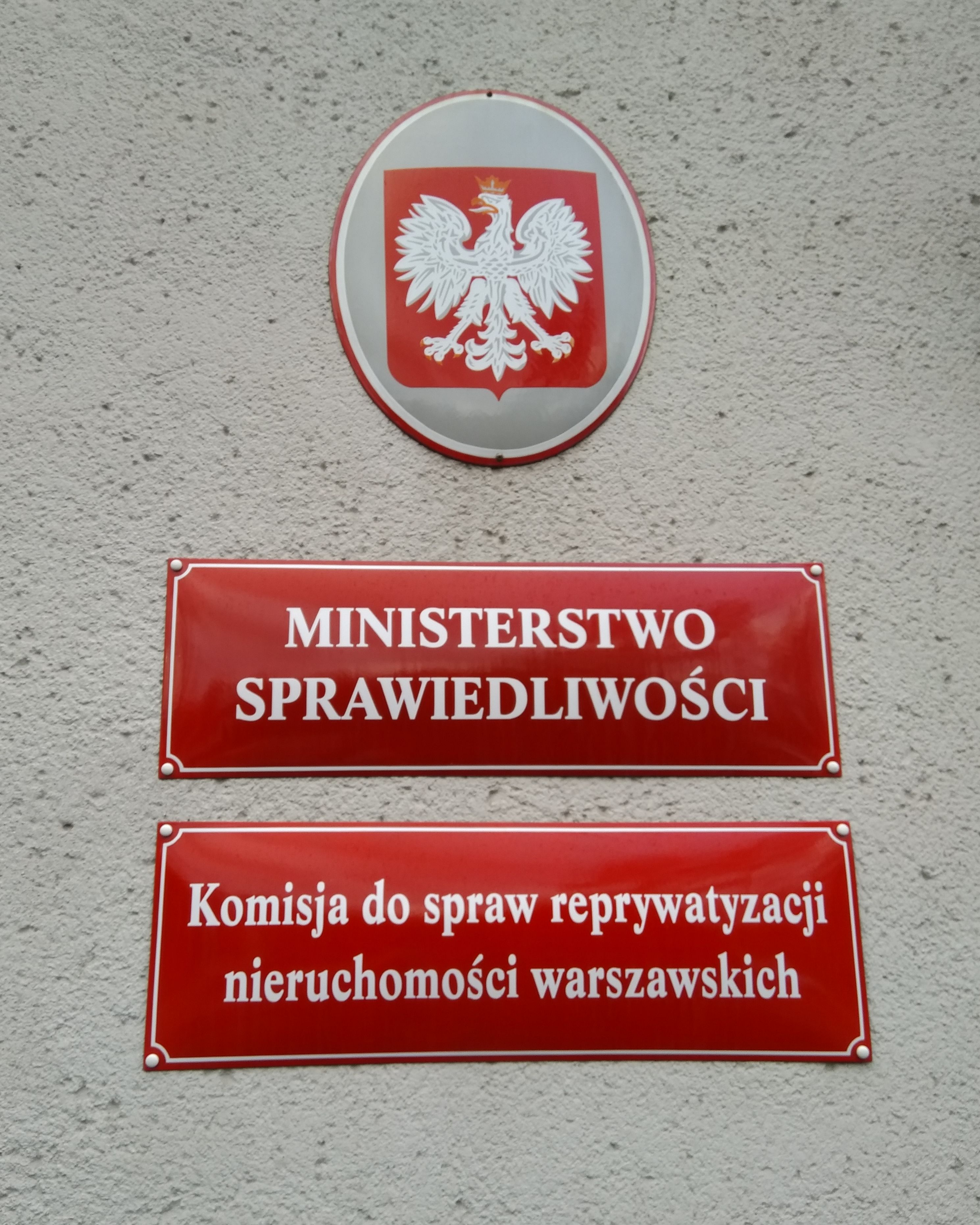 Siedziba tzw. komisji reprywatyzacyjnej na Al. Ujazdowskich